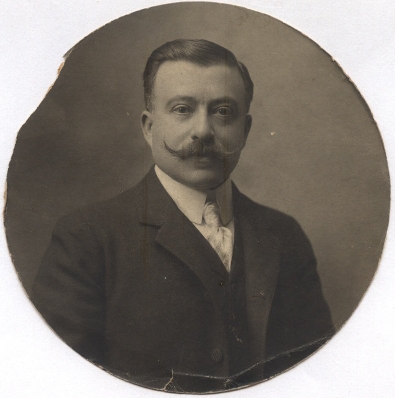 Unica foto existente de Gabriel Hilario Larralde, la que obra en poder de la familia Larralde